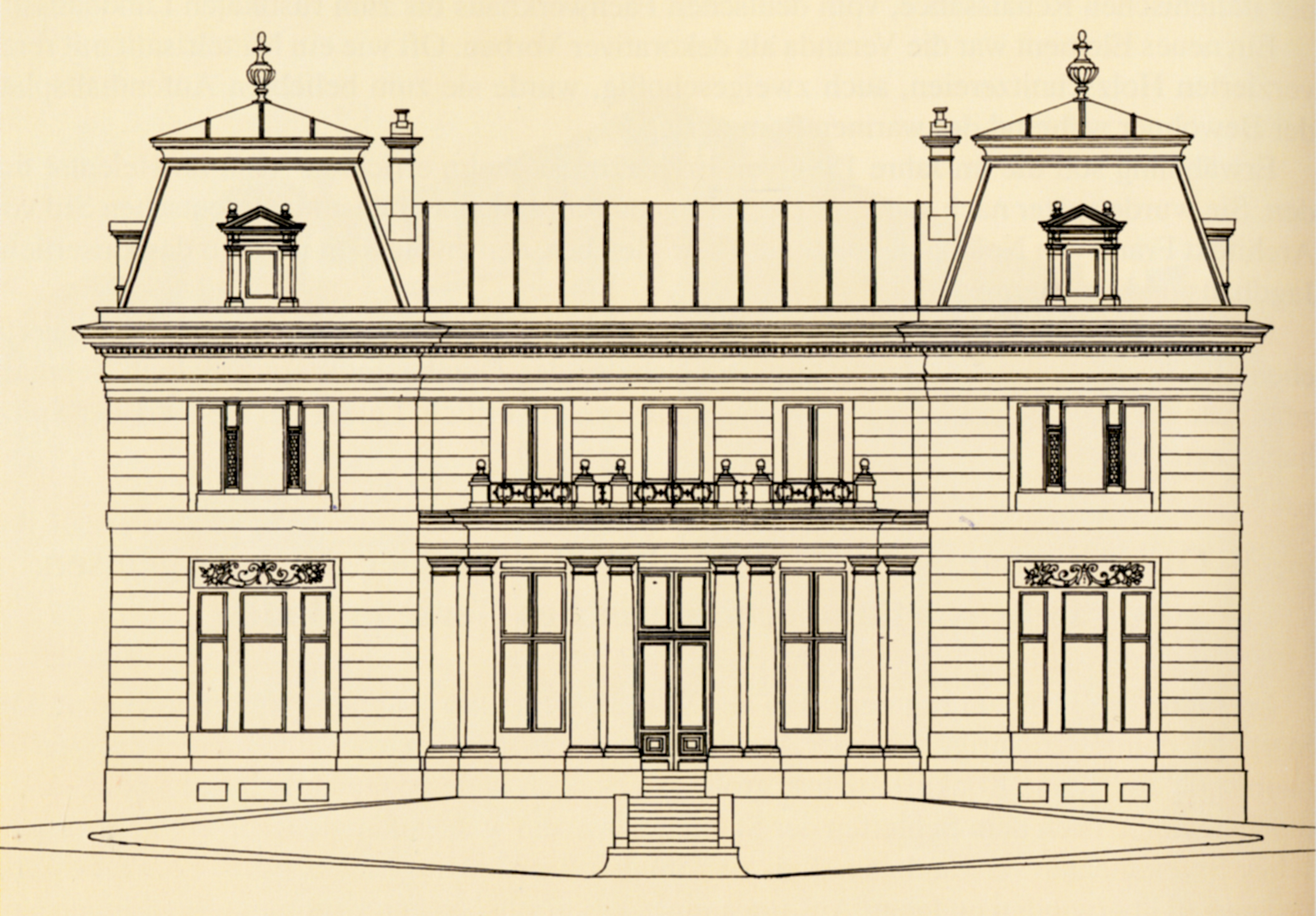 Baden bei Wien, Weilburgstraße 81-85, Plan der Nordfassade zur Erbauung der Villa Samuel Ritter von Hahn